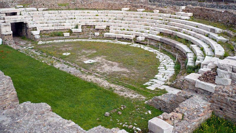 Teatro di ventimiglia